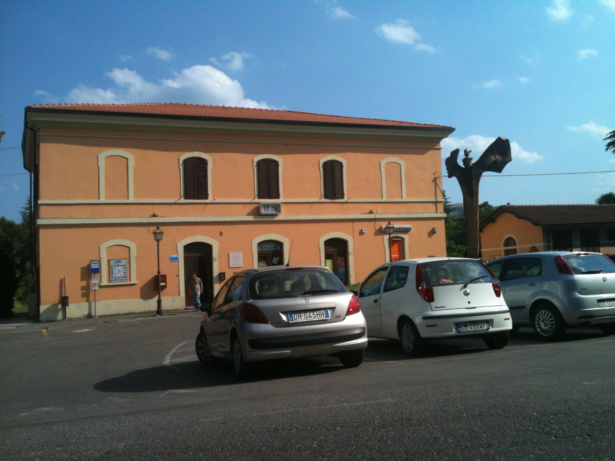 fabbricato viaggiatori della stazione di brisighella (ra)